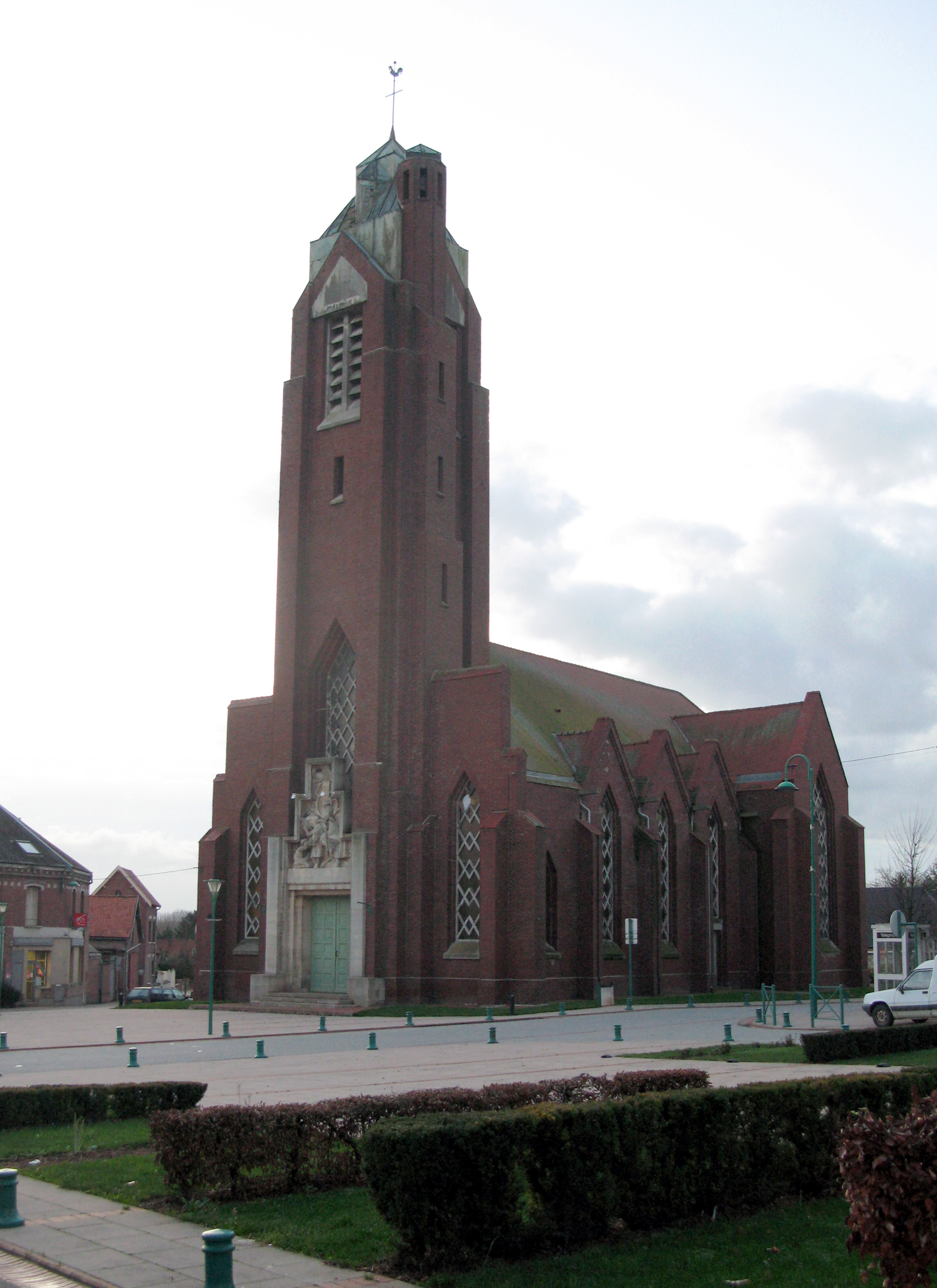 Roisel (Somme, France) - L'église. .